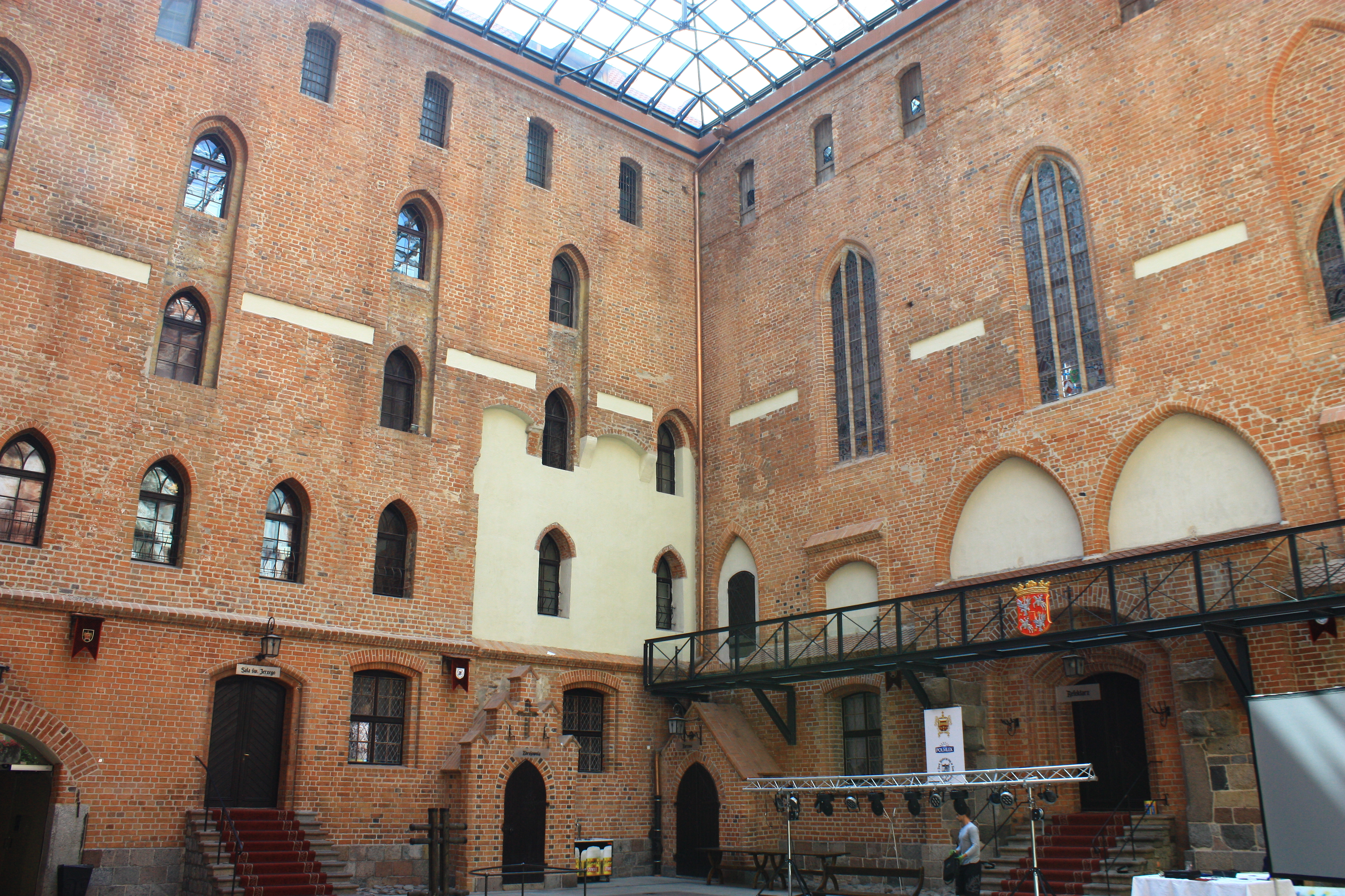 Gniew, zamek krzyżacki, XIII-XIV, XIX